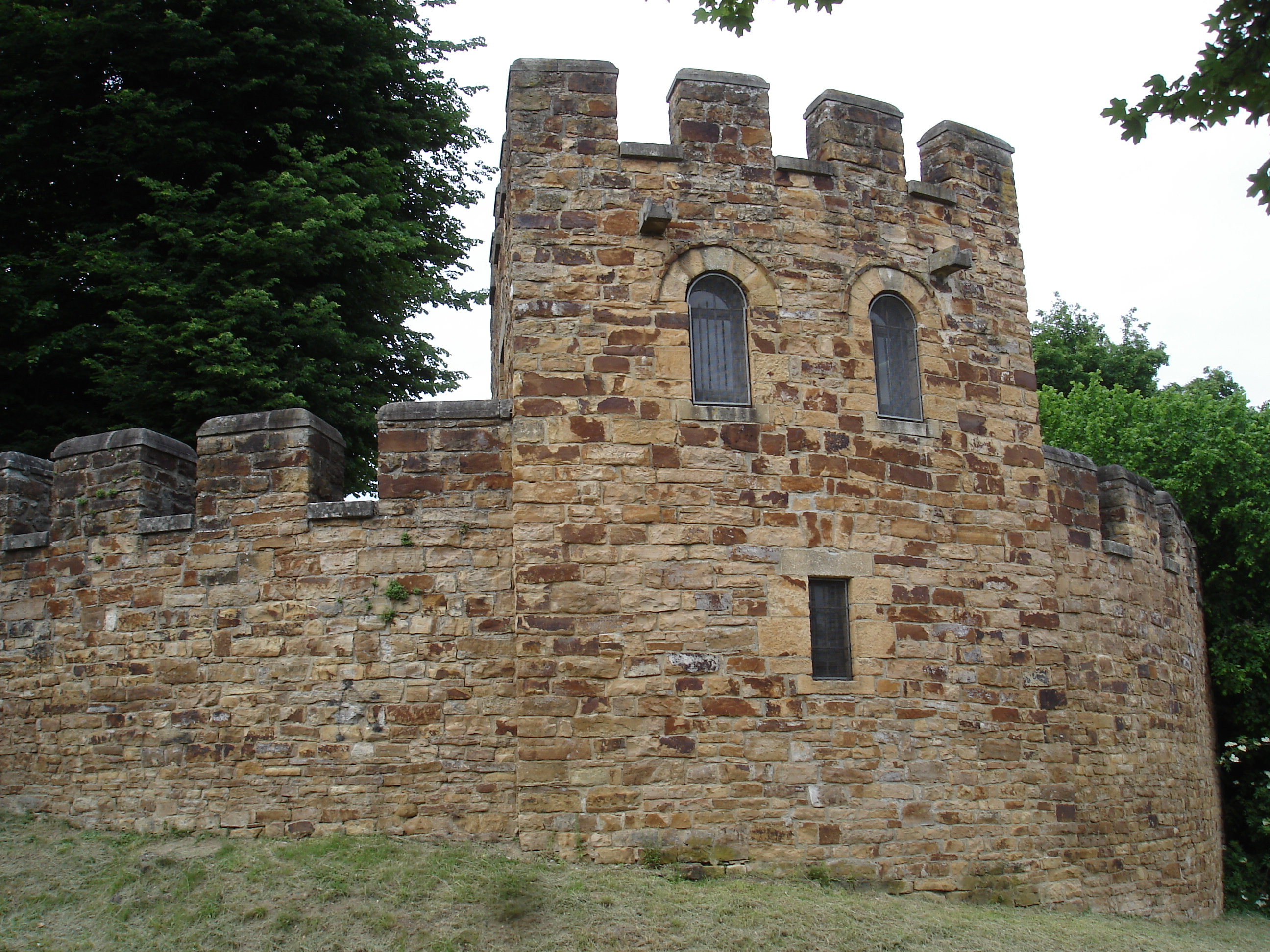 Rekonstruierter Kastellturm von 1911